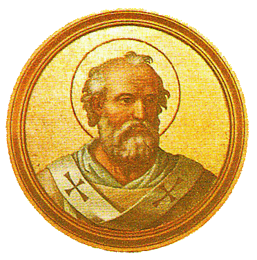 Papież Bonifacy IV